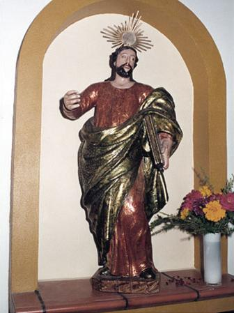 Imagem de São Tiago Menor na Matriz de Peral